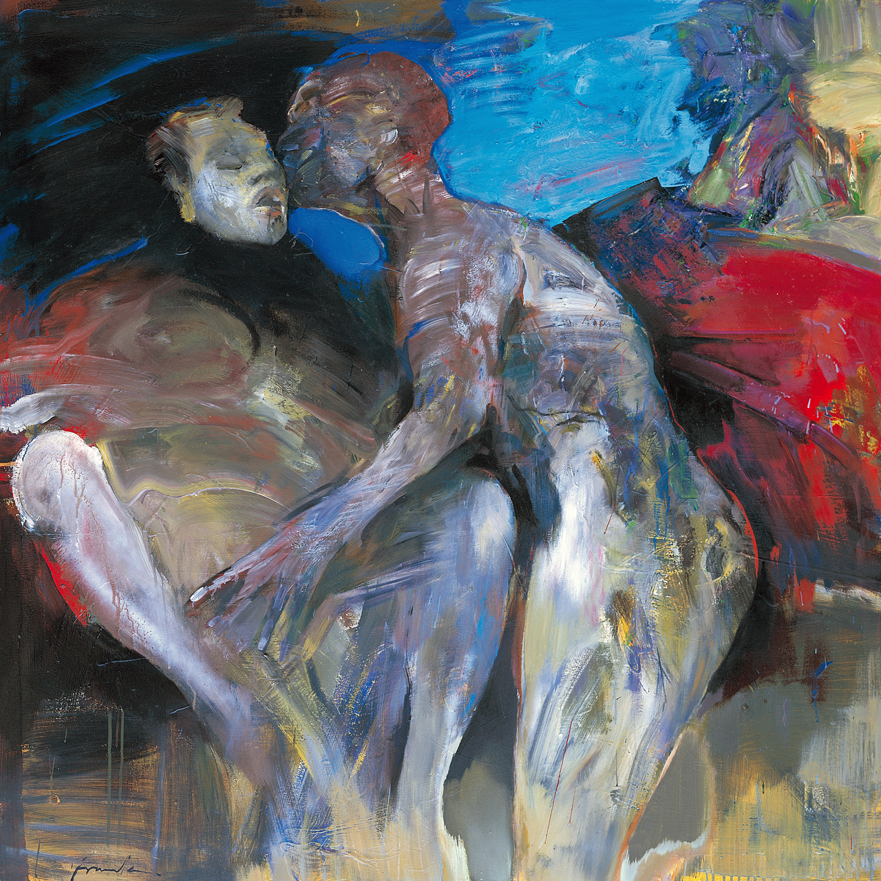 Franta, Pár (1998), akryl na plátně 150 x 150 cm